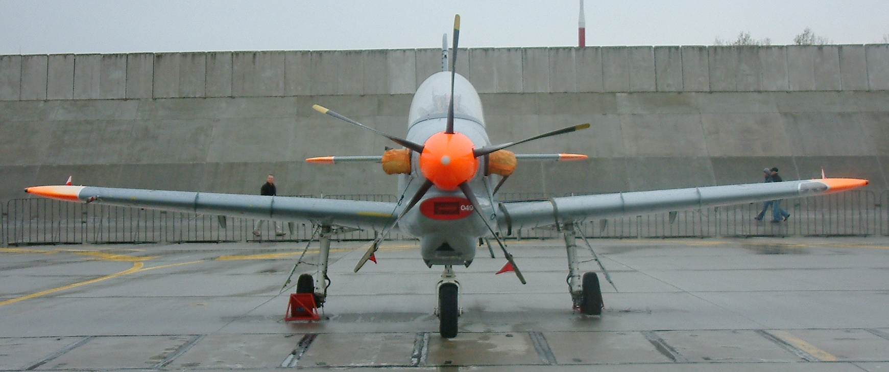 PZL-130TC-1 Orlik #049 of Polish Air Force, 31st. Air Base Poznań-Krzesiny